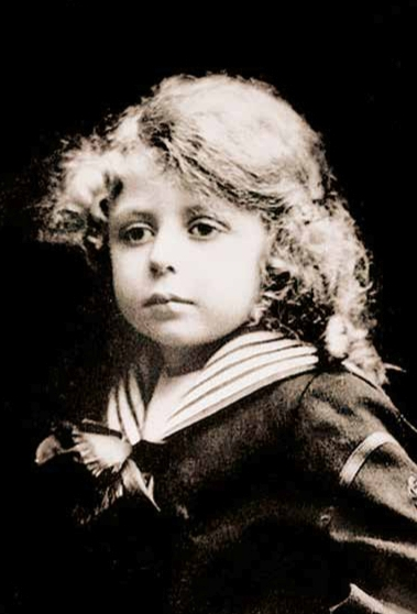 Jean-Paul Sartre enfant vers 1910. Photographe non précisé ou inconnu. Publié dans Children par Olivier Suter, éditions Patrick Frey, 2019. ISBN 9783906803999